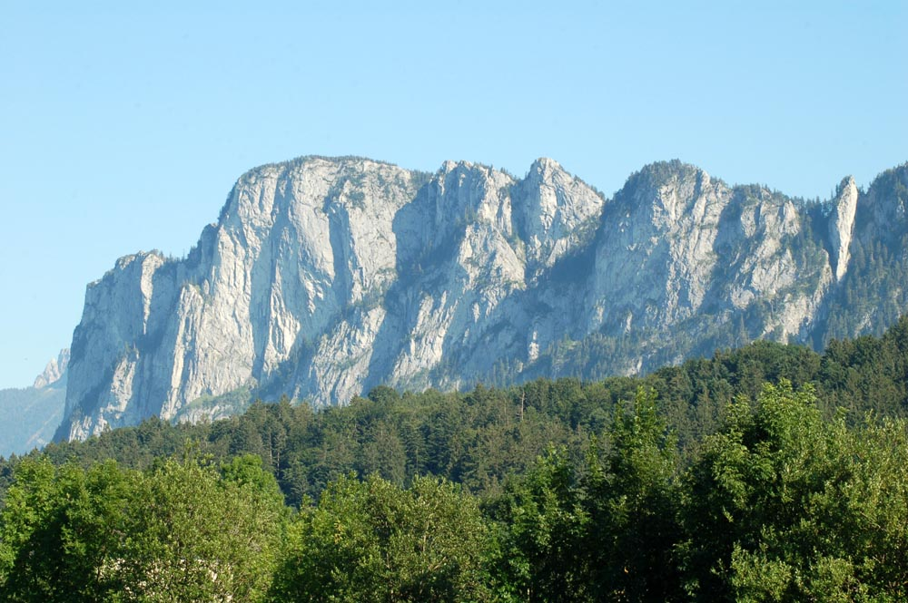 Drachenwand von Nordwest, Keuschen, Teufelmühle